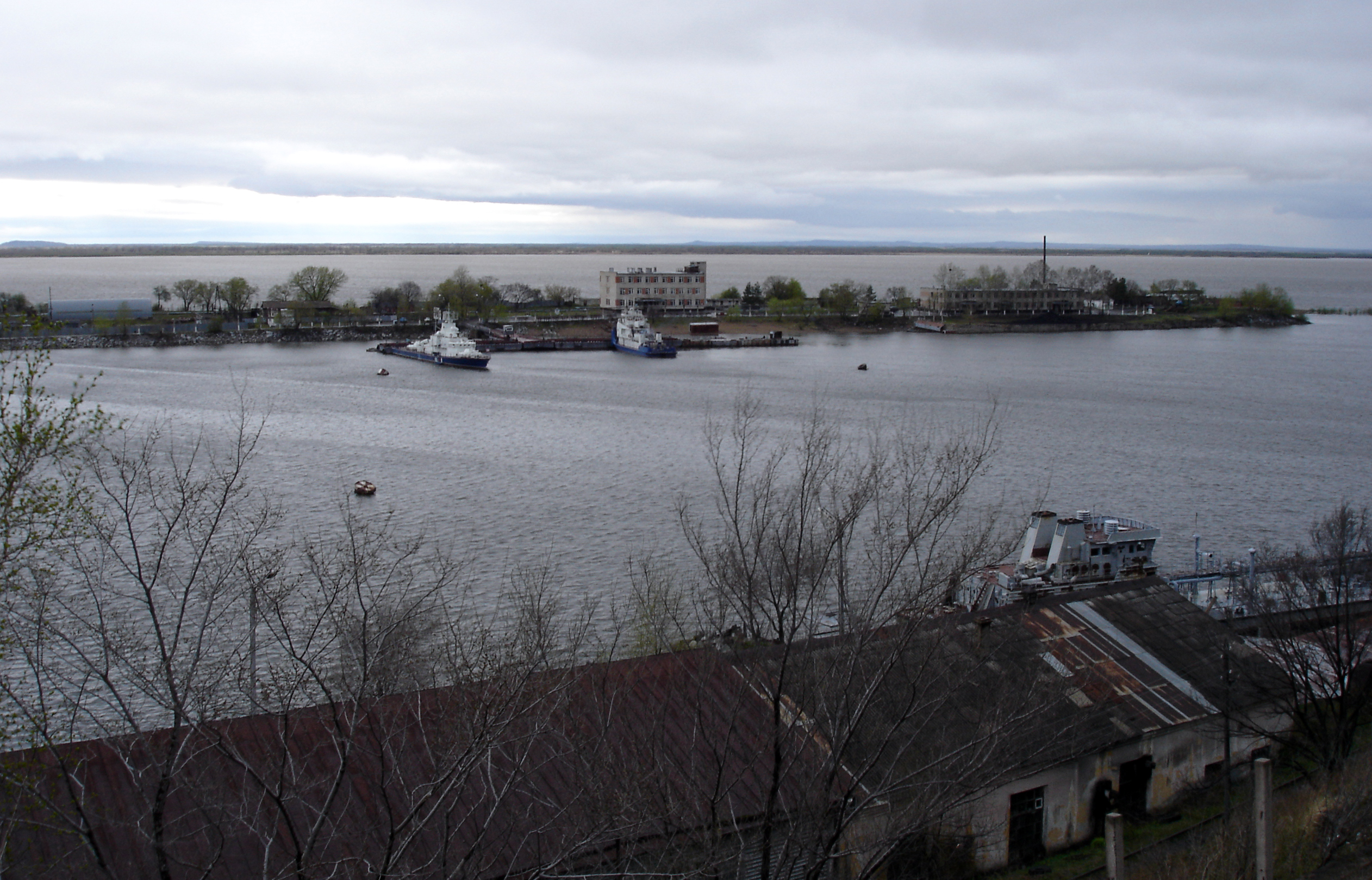 Заячий островВид на Заячий остров, дивизион пограничных кораблей